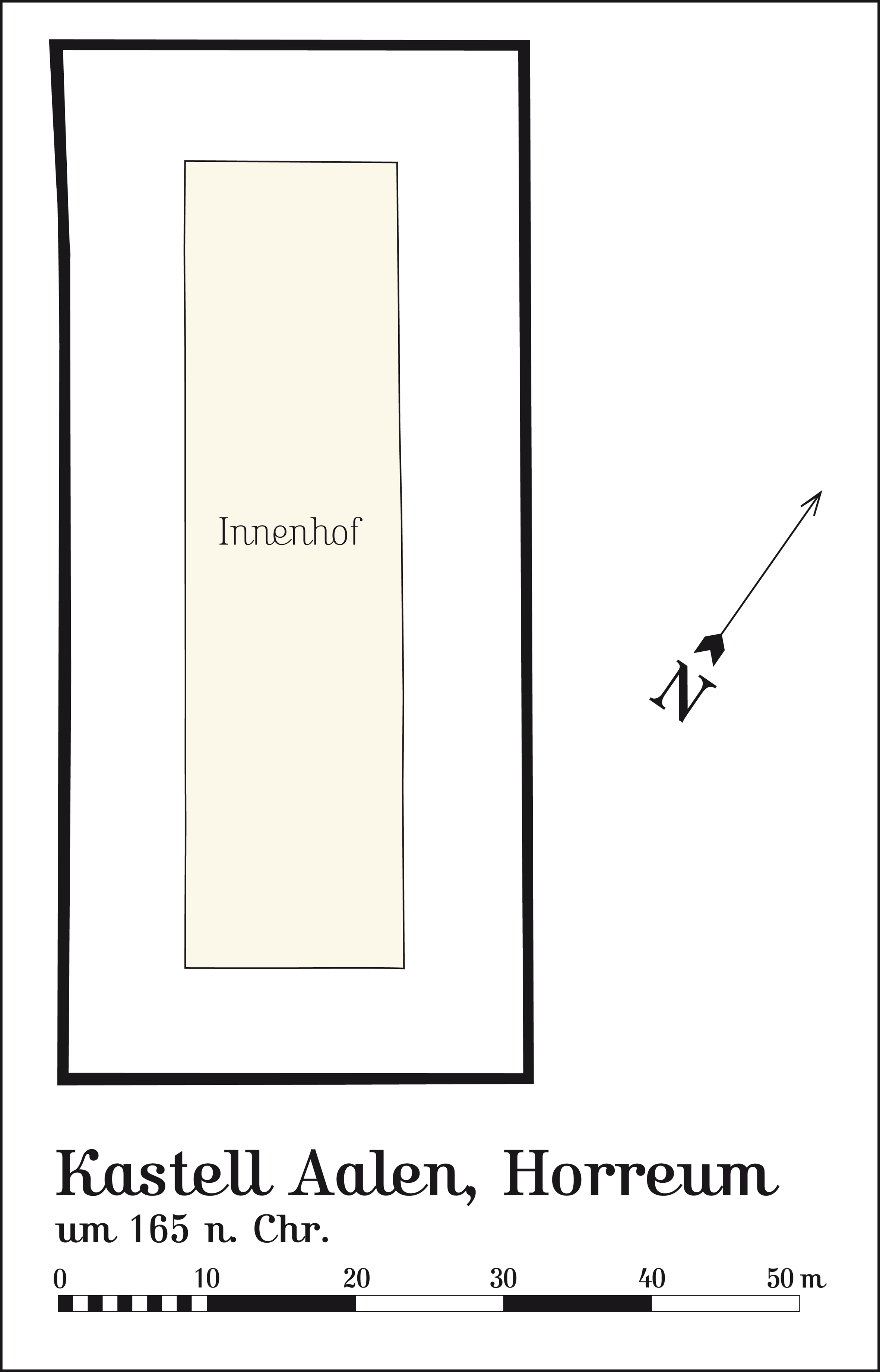 Reiterkastell Aalen, Baden-Württemberg, Horreum (Getreidespeicher). Hergestellt am Macintosh unter Macromedia Freehand MX; abgespeichert für Wikipedia unter Adobe Photoshop CS 2.